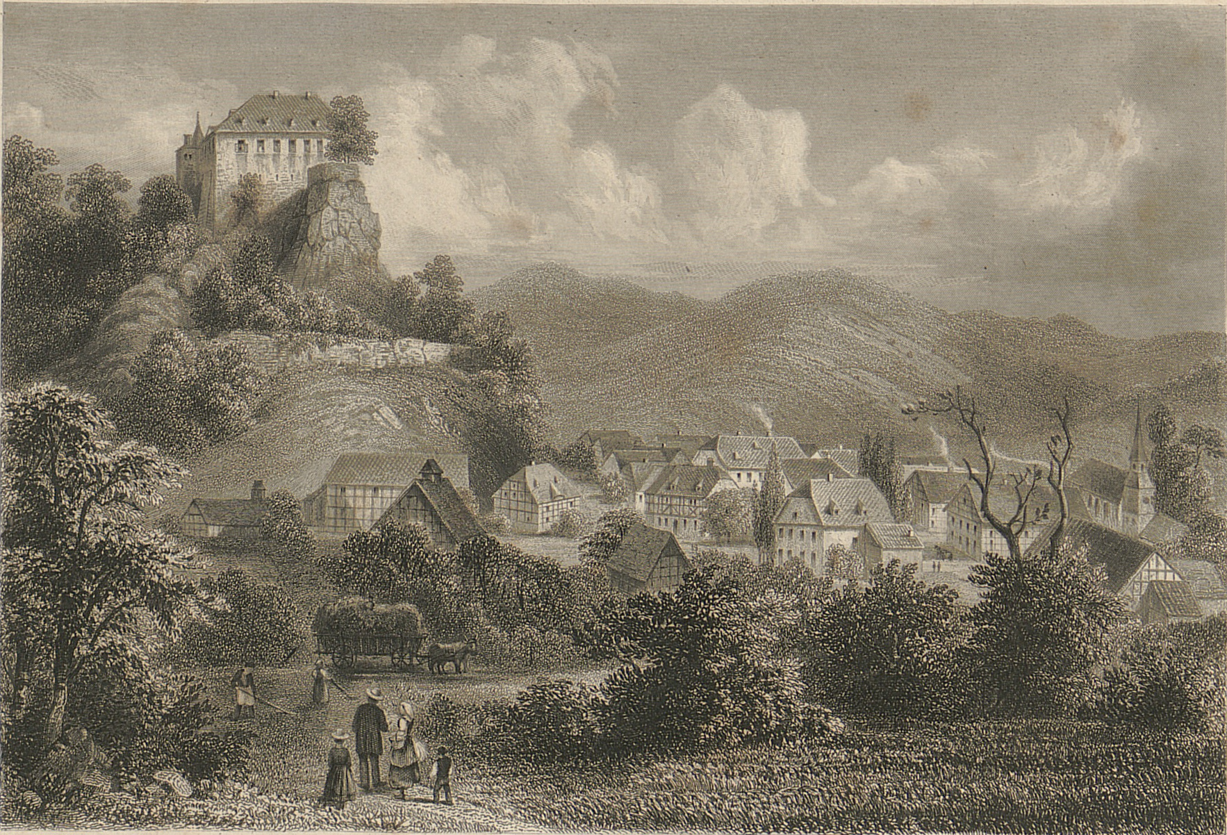 Bilstein